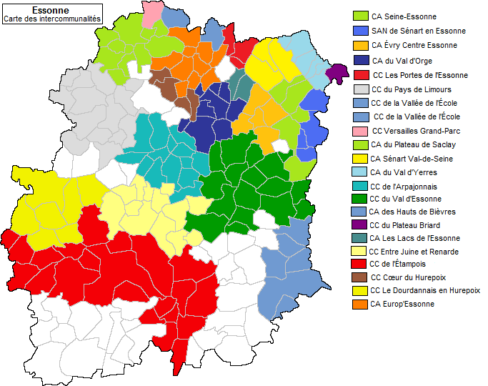 Carte des intercommunalités en Essonne en 2006.